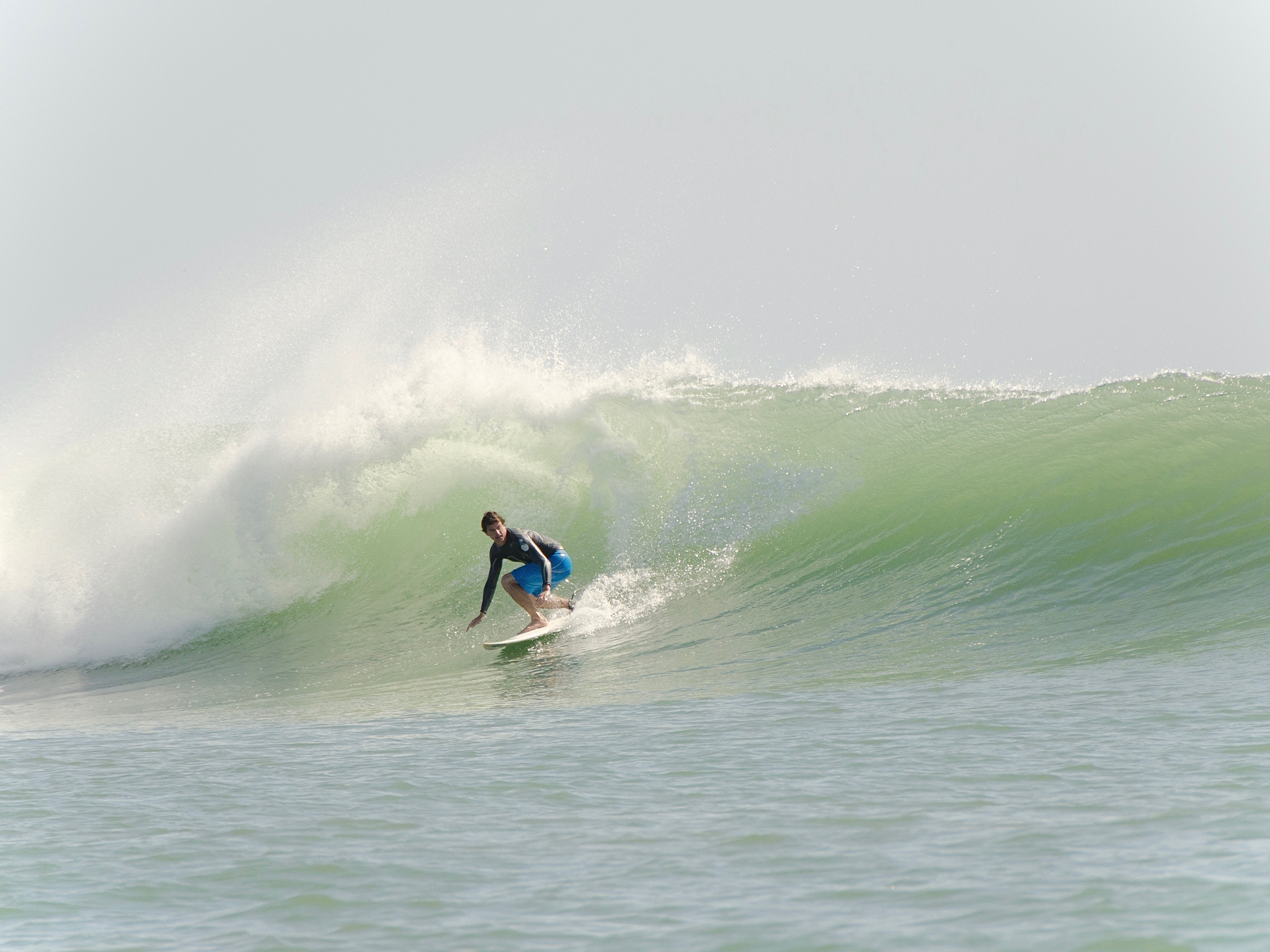 Jaka Grosar, Bali